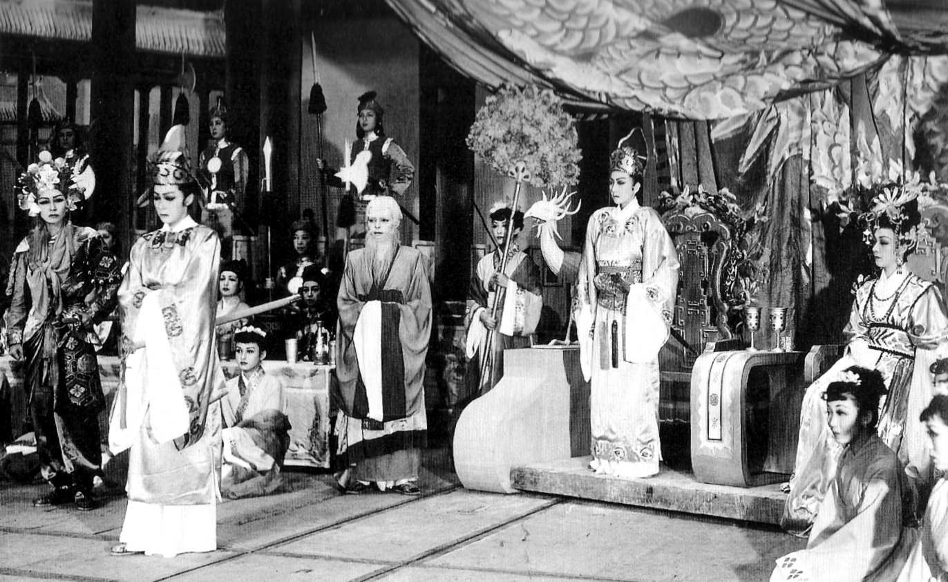 星組「虞美人」より、鴻門の会(Feast at Hong Gate)の場面。項羽：春日野八千代(Kasugano Yachiyo)・劉邦：神代錦(Kamiyo Nishiki)